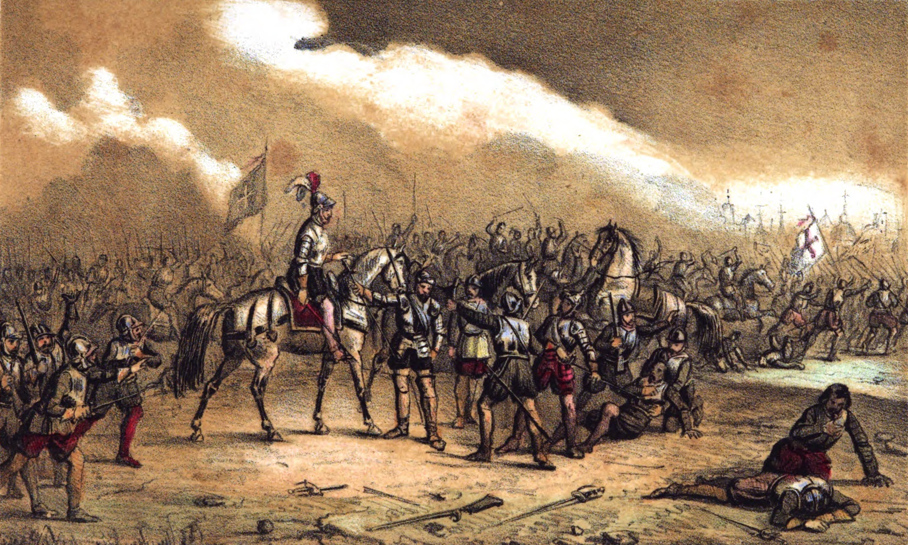 Batalla de Villalar.